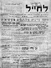 עיתון הבריגדה